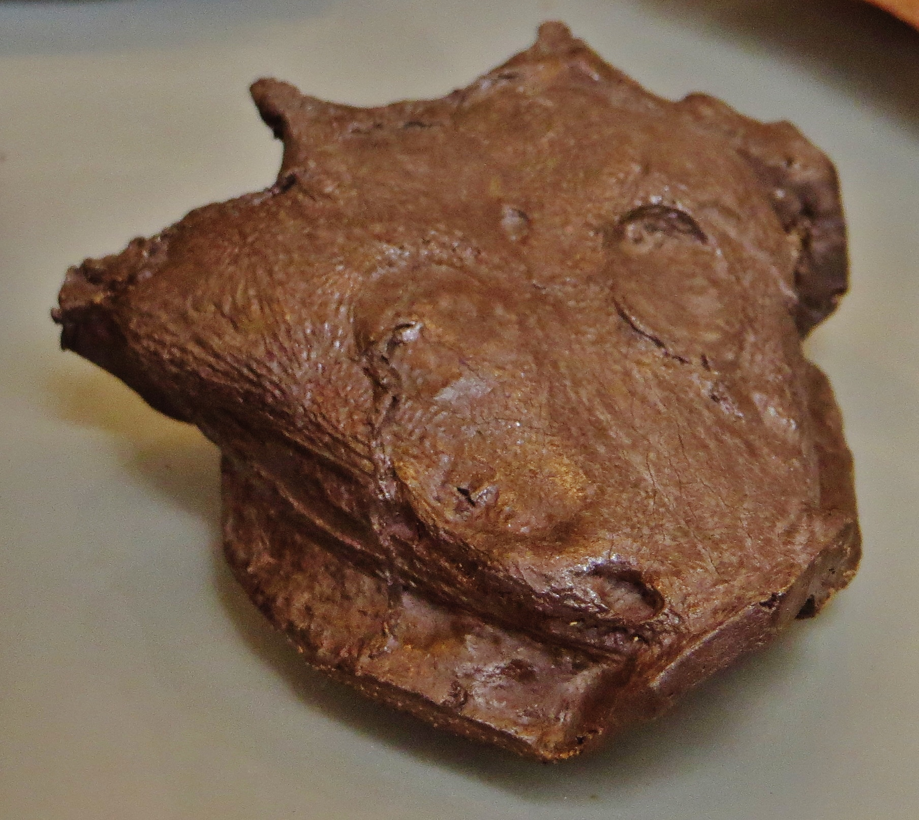 Edingerella fossil skull